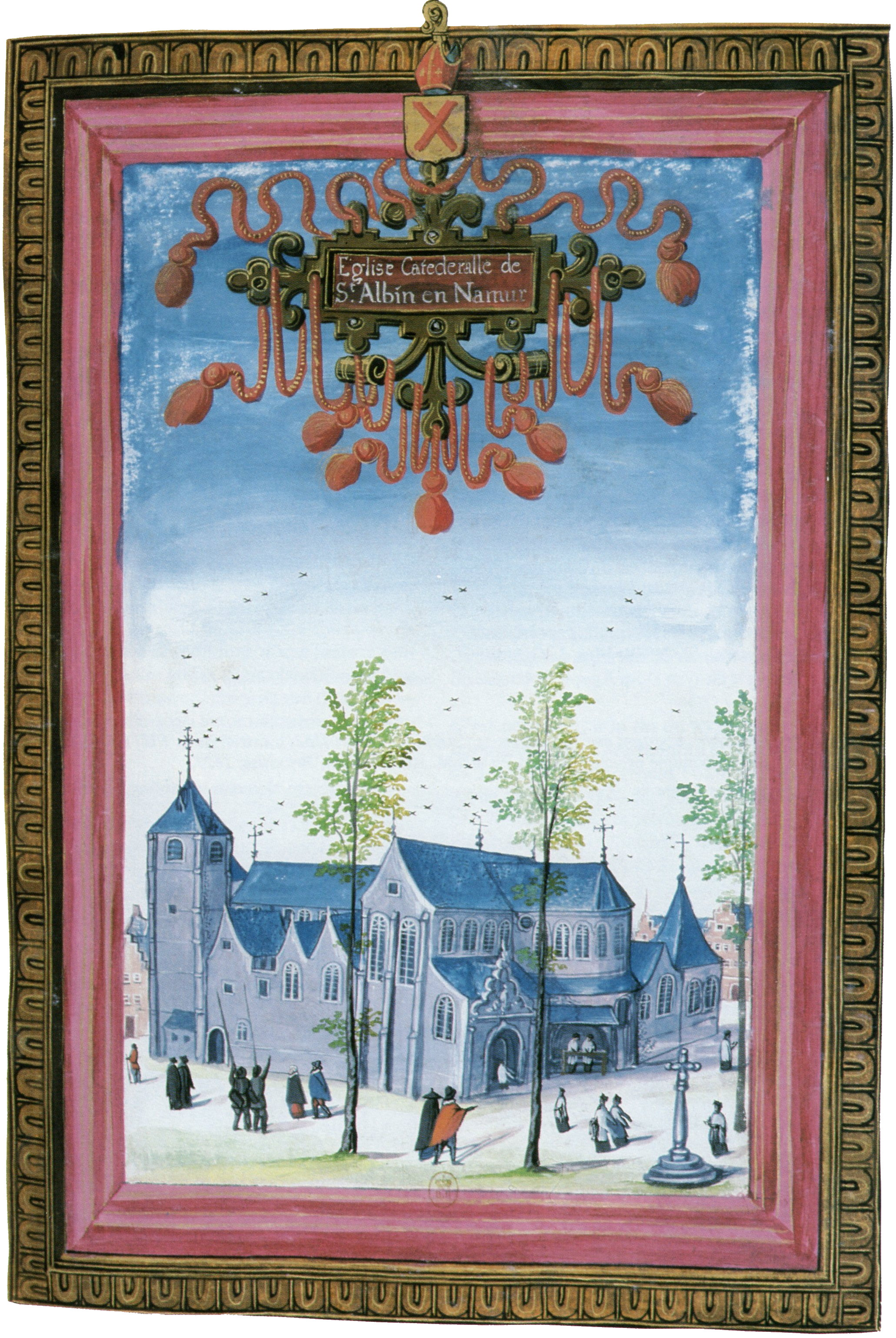 Cathédrale Saint-Aubain de Namur, en 1604. Albums de Croÿ, Paris, Bibliothèque nationale.